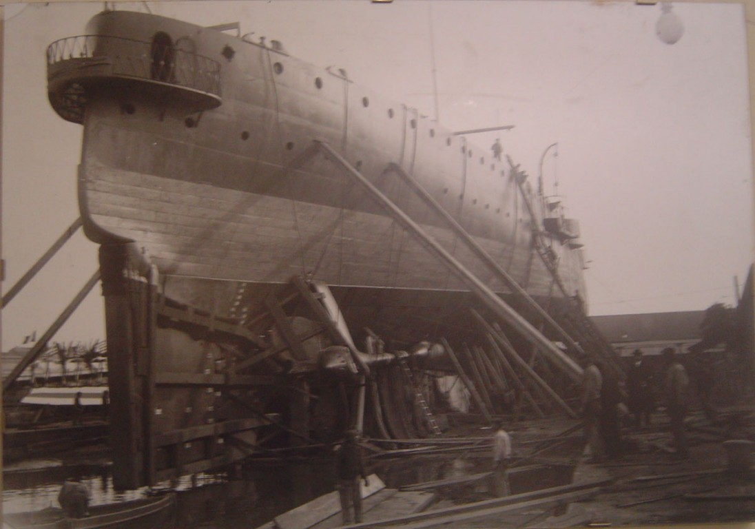 Incrociatore corazzato "Averoff" in costruzione, 1911 (AS Livorno, Archivio storico del Cantiere navale Luigi Orlando)